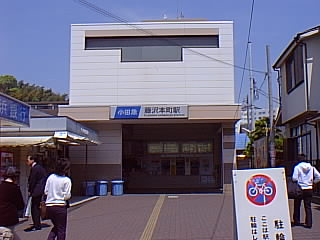 Fujisawa Hommachi Station east exit, on the Odakyu Enoshima Line, Fujisawa, Kanagawa 藤沢本町駅